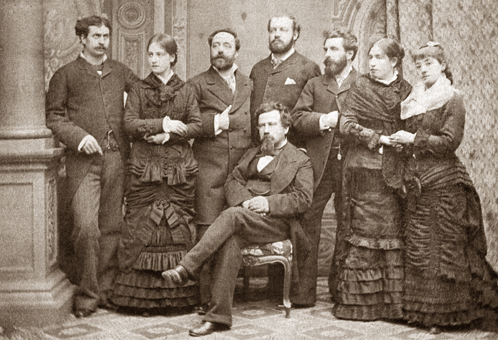 descrizione: Amilcare Ponchielli in posa con gli interpreti della prima rappresentazione (8 aprile 1876 al Teatro alla Scala di Milano) dell'opera lirica La Gioconda. data: aprile 1876 autore: ignoto fonte: scansione (con lieve ritocco per pulizia) da Ponchielli in i Grandi dell'Opera, volume IV, De Agostini, 1989. Riferimento per l'originale: archivio fotografico De Agostini. Note alla licenza: La foto ricade molto probabilmente nel pd-old, ma la non conoscenza della data di morte dell'autore non esclude che questa sia posteriore al 1937 e quindi non compatibile con tale licenza alla data di inserimento di questa immagine in wikipedia. La foto viene quindi licenziata come pd-italy rispettandone i requisiti. In particolare, date le limitazioni tecniche dell'epoca della foto, la posa secondo i canoni della ritrattistica dei personaggi non è valutabile come «artistica» o tale da rendere artistica la foto, ma come una necessità tecnica per la buona riuscita della medesima.